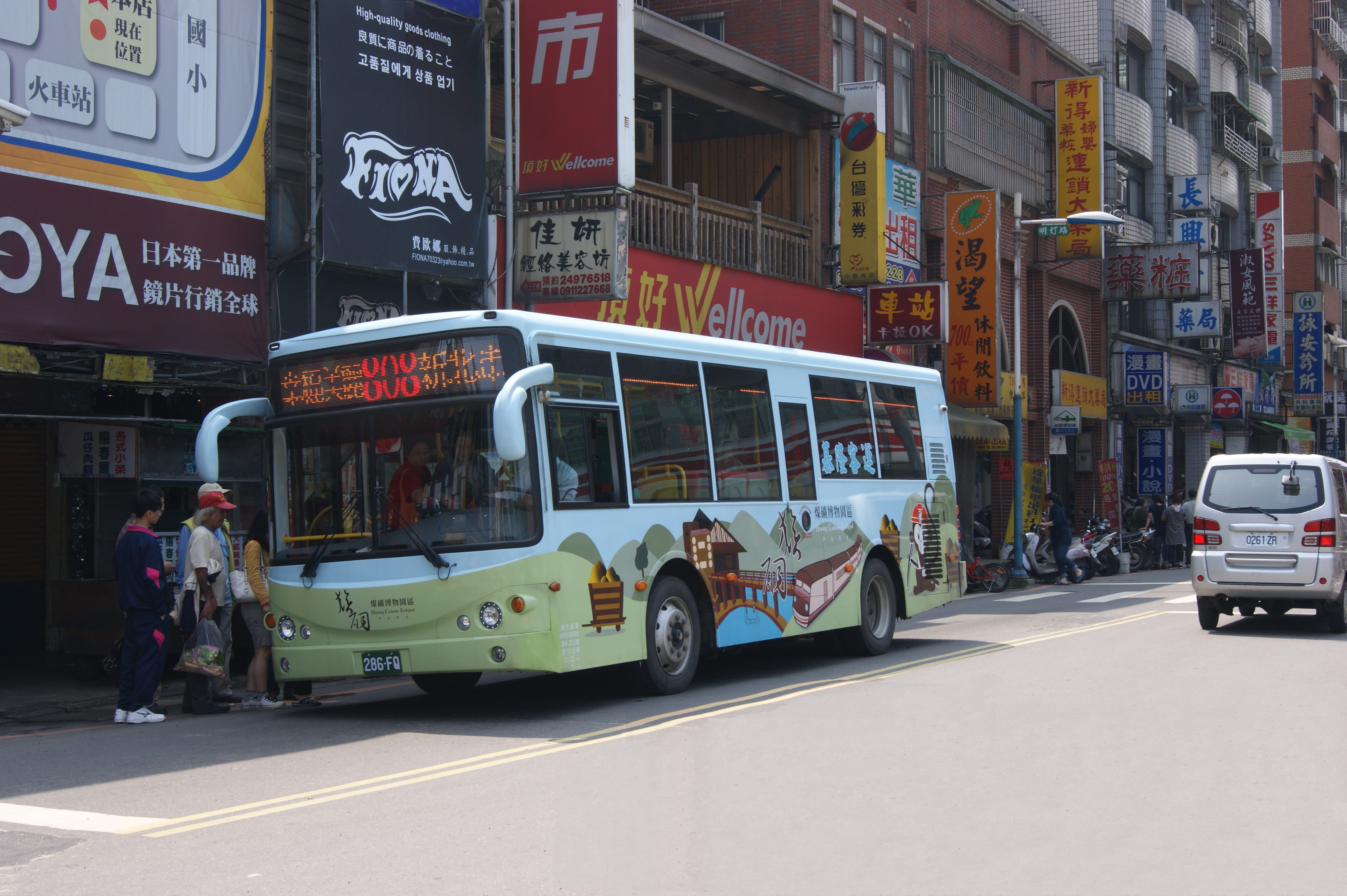 基隆客運猴硐煤礦博物園區彩繪公車286-FQ，車型為2010年KINGLONG KL685021A1-3，行駛新北市市區公車808線。攝於臺灣鐵路管理局瑞芳車站前的公車招呼站。